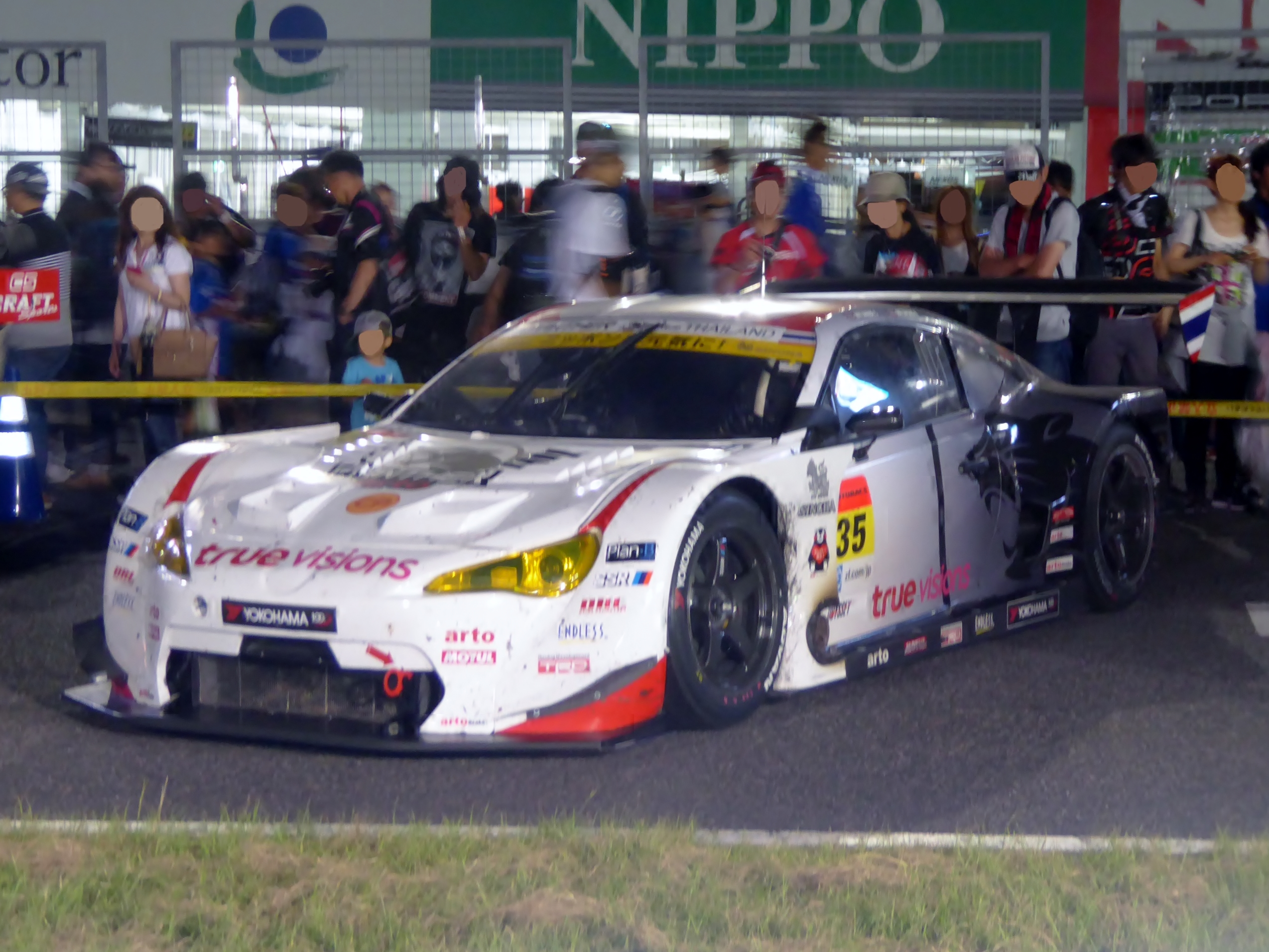 2017年鈴鹿1000km終了後の35号車ARTO 86 MC 101を撮影。